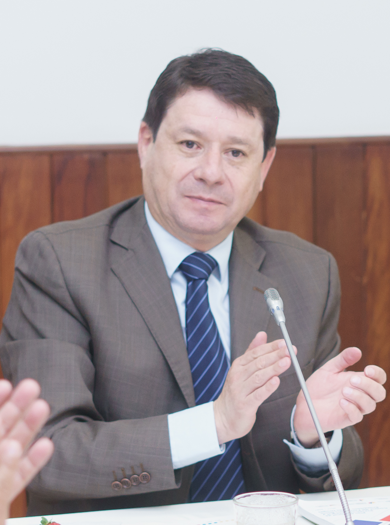 Tema: Asambleísta María Mercedes Cuesta invita a la presentación del Grupo Parlamentario para la Prevención y Tratamiento Integral del Fenómeno de las Drogas en el Ecuador, con la participación del Presidente de la Asamblea Nacional Fotografía por: Alexander Moya / Asamblea Nacional 18 de enero de 2018 - Presentación del Grupo Parlamentario para la Prevención y Tratamiento Integral del Fenómeno de las Drogas en el Ecuador Tema: Asambleísta María Mercedes Cuesta invita a la presentación del Grupo Parlamentario para la Prevención y Tratamiento Integral del Fenómeno de las Drogas en el Ecuador, con la participación del Presidente de la Asamblea Nacional Fotografía por: Alexander Moya / Asamblea Nacional